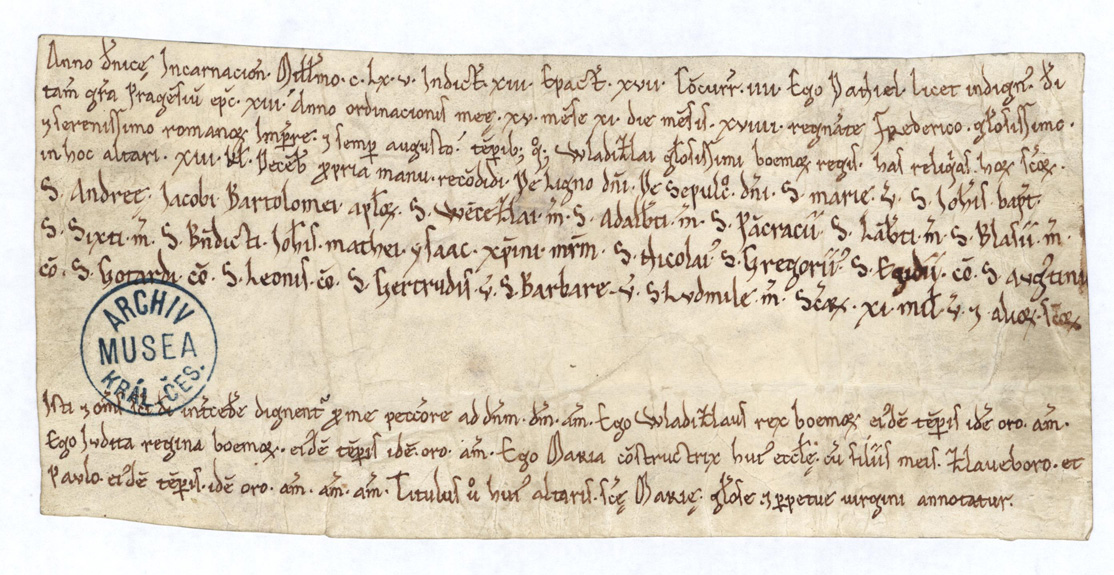 Autentika pražského biskupa Daniela I. pro kostel svatého Jakuba Staršího v Jakubu. Dnes uložena. Archiv Národního muzea, fond Sbírka pergamenových listin A4. Vydána např. v Codex diplomaticus regni Bohemiae I, č. 230[1].